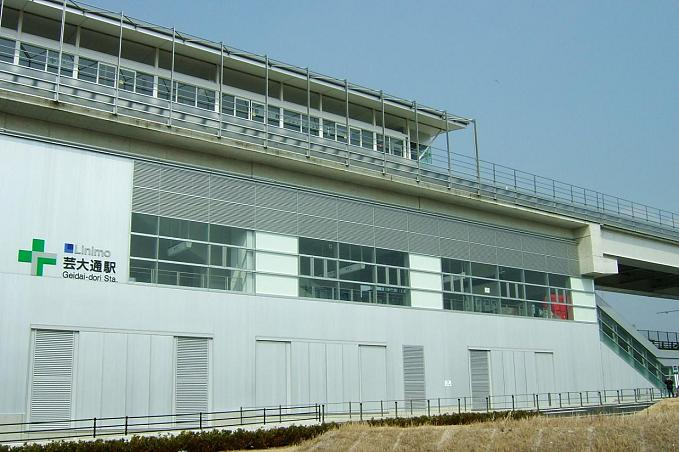 愛知県愛知郡長久手町大字岩作に所在する東部丘陵線（リニモ）の芸大通駅。